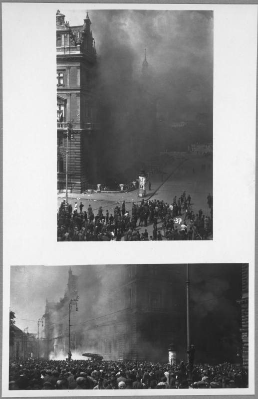 Darstellung in zwei Aufnahmen des Brandes des Justizpalates in Wien, 15.Juli 1927.